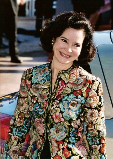 Marie-José Nat au festival de Cannes